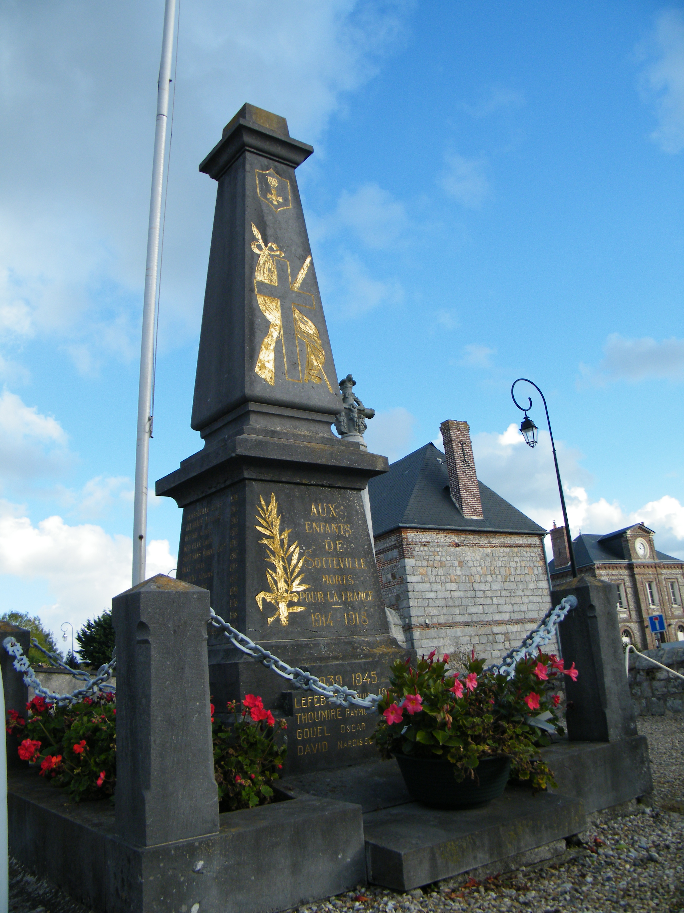 Sotteville-sur-Mer, Seine-Maritime, monument aux morts des deux guerres mondiales.